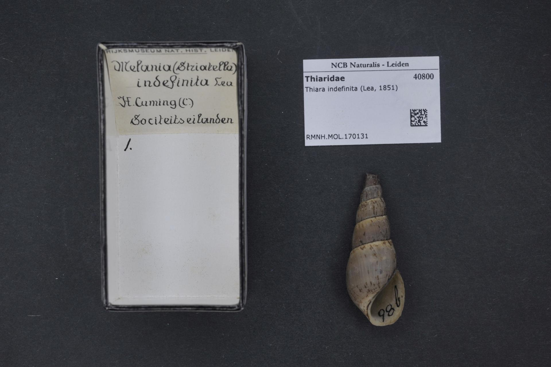 Thiara indefinita (Lea, 1851)